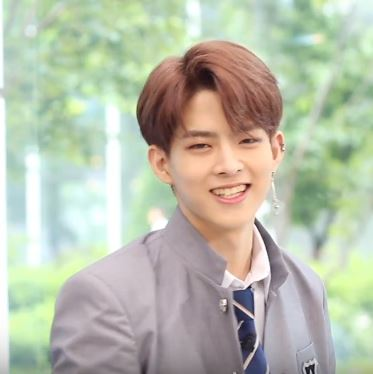 서울 마포구 tbs에서 강하고 색다른 연예 토크쇼! 팩트인스타 ‘스타인터뷰(MC준): 빅톤편’ 녹화가 진행됐다. 2016년 11월, 세상을 향한 목소리로 큰 포부를 외친 ‘빅톤(VICTON)’은 그동안 4번의 미니앨범으로 대중들에게 청량함과 퍼포먼스 통해 다양한 매력을 보여줬다.